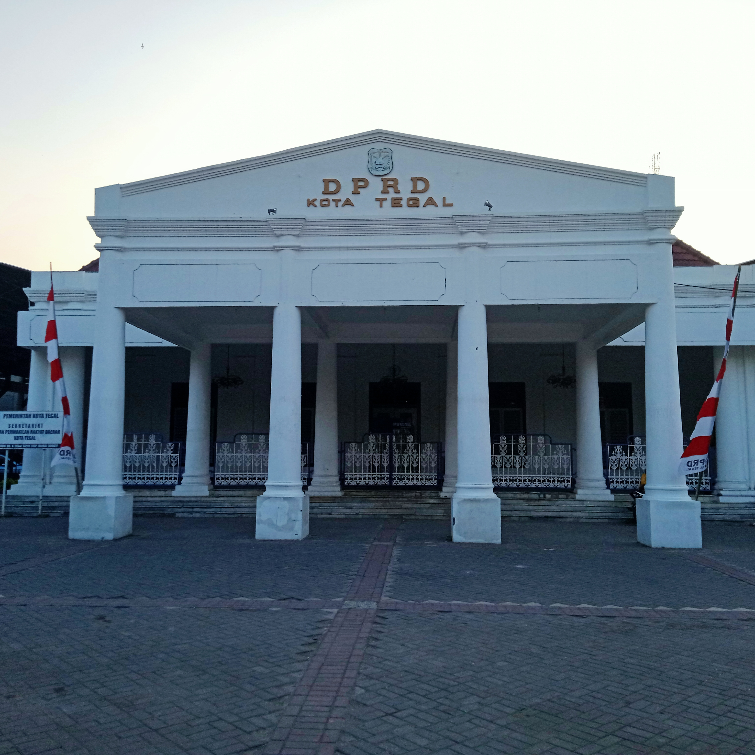 Gedung DPRD Kota Tegal